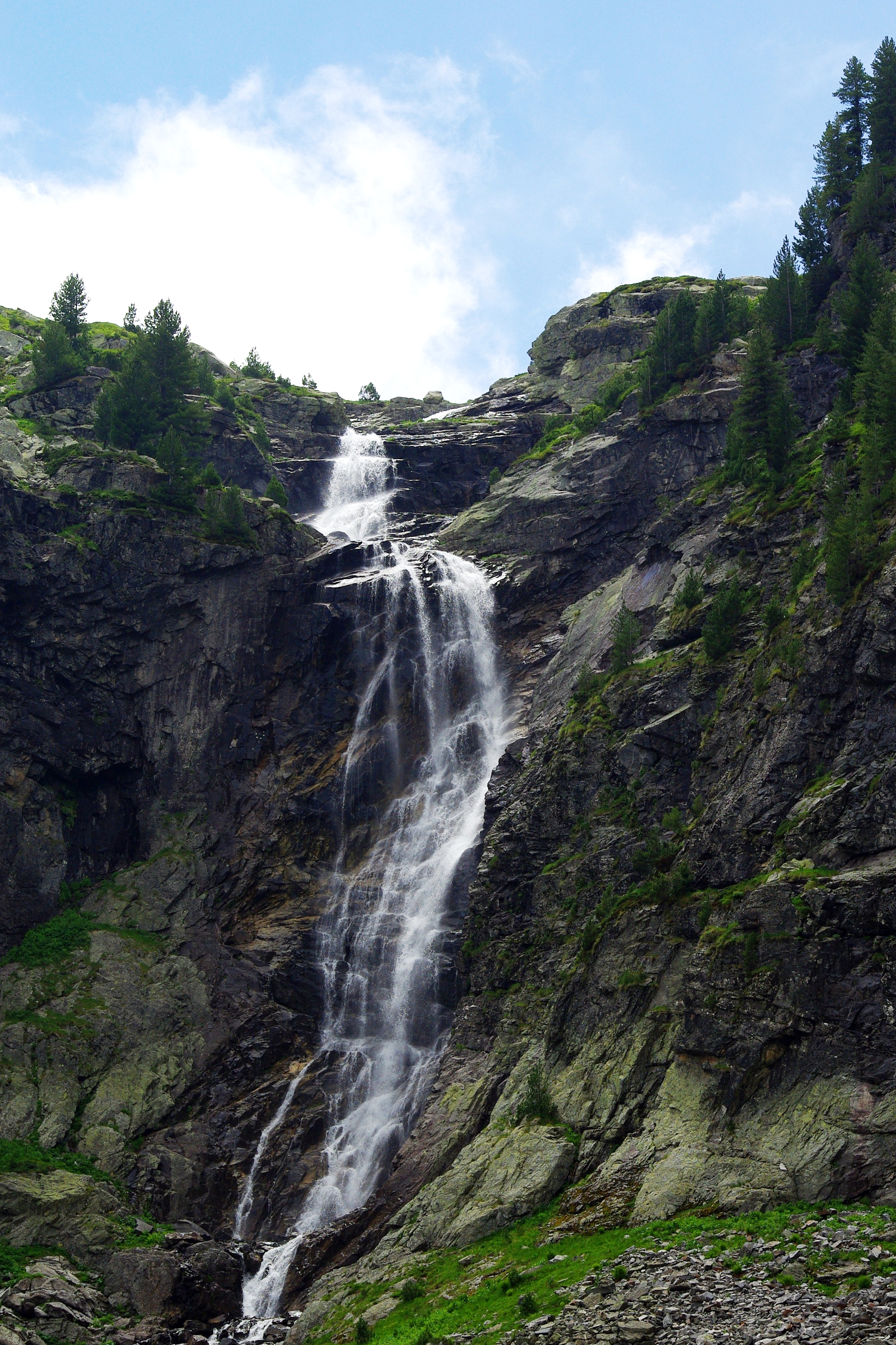 Водопад Скакавица в Скакавишката долина в подножието на източния склон на вр. Кабул, Северозападна Рила.